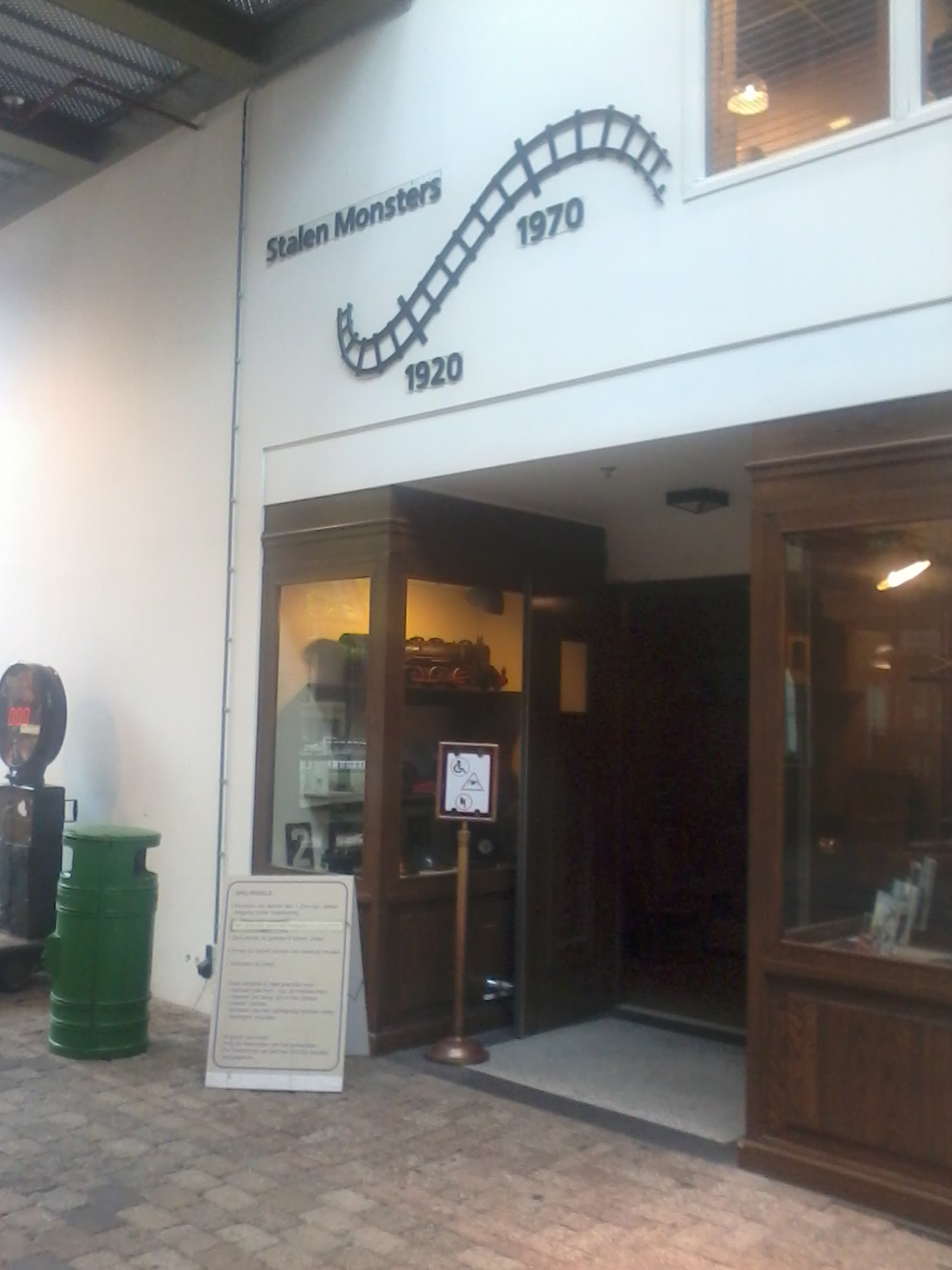 Ingang van de darkride Stalen Monsters in het Nederlands Spoorwegmuseum.